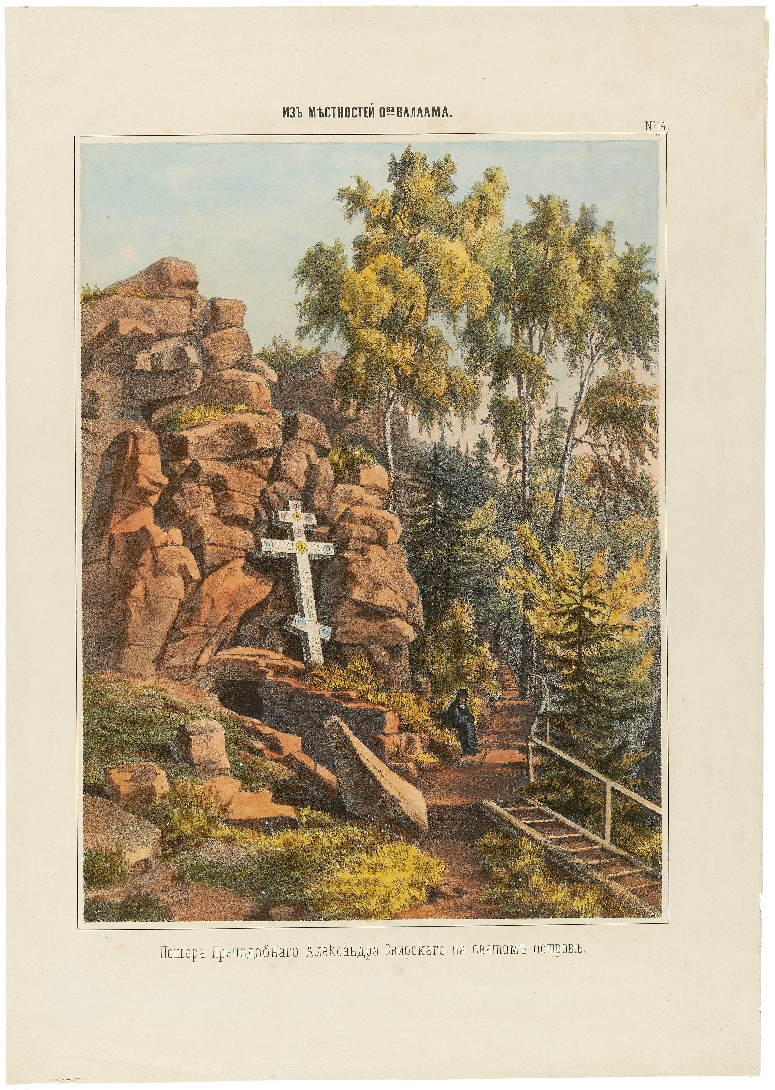 Pyhittäjä Aleksanteri Syväriläisen luola Pyhityssaaressa